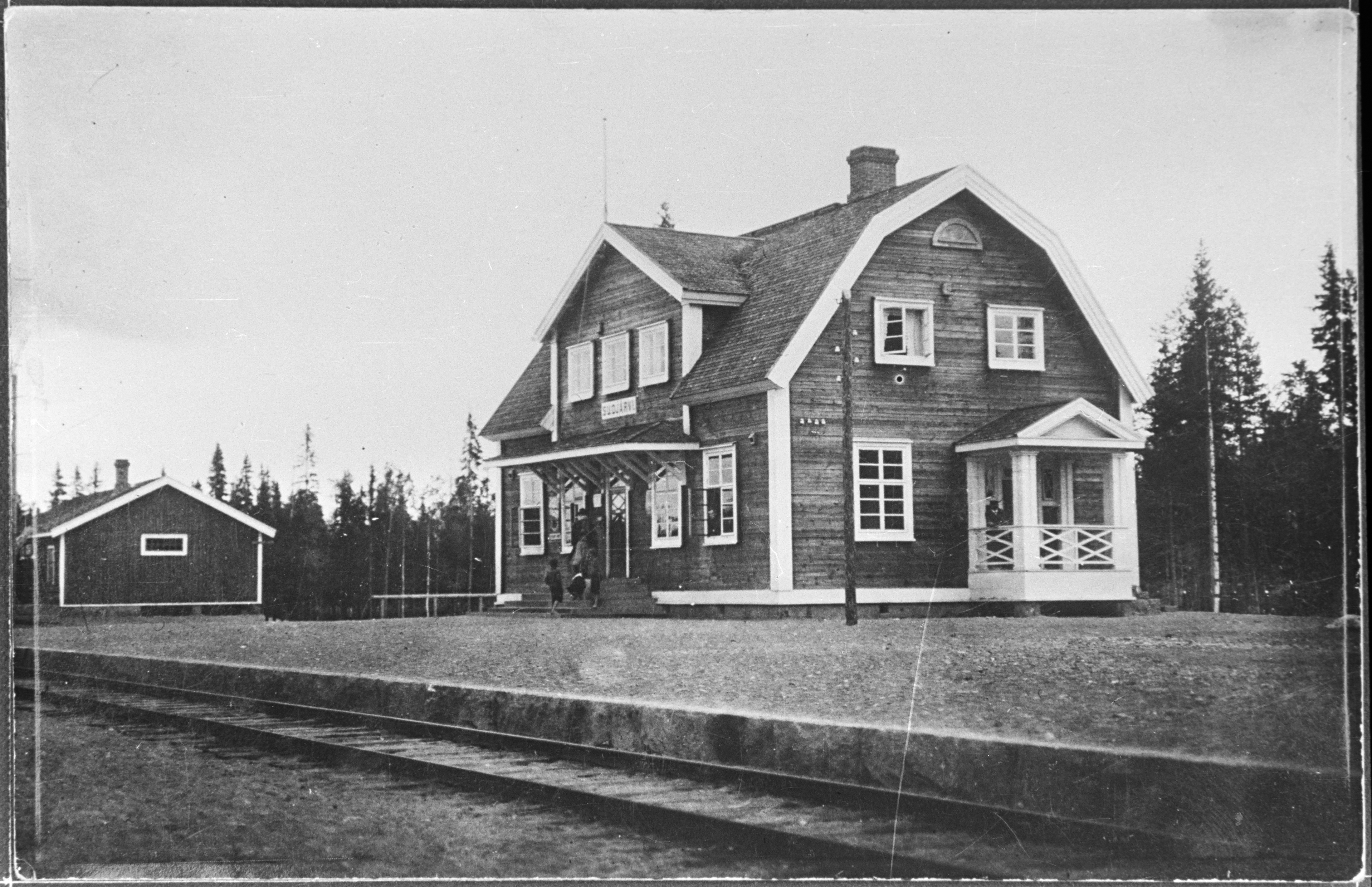 Первый вокзал Суоярви, 1923-1939 гг.